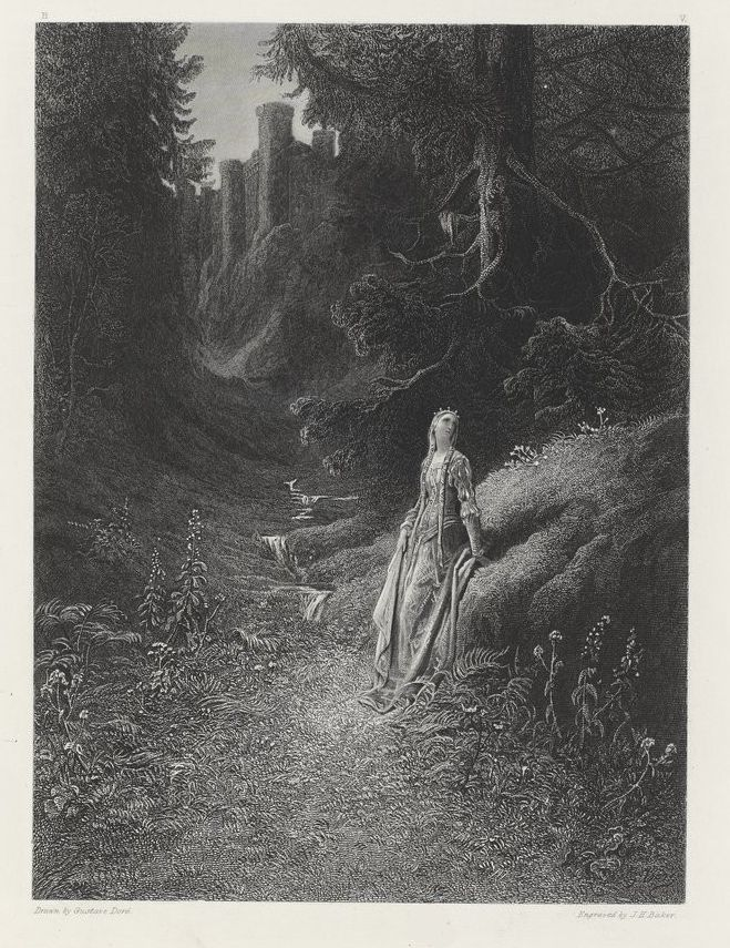 Élaine se leva alors, prit sa course à travers les champs... Ainsi, jour par jour, elle passait et repassait comme un fantôme dans l'un et l'autre crépuscule.